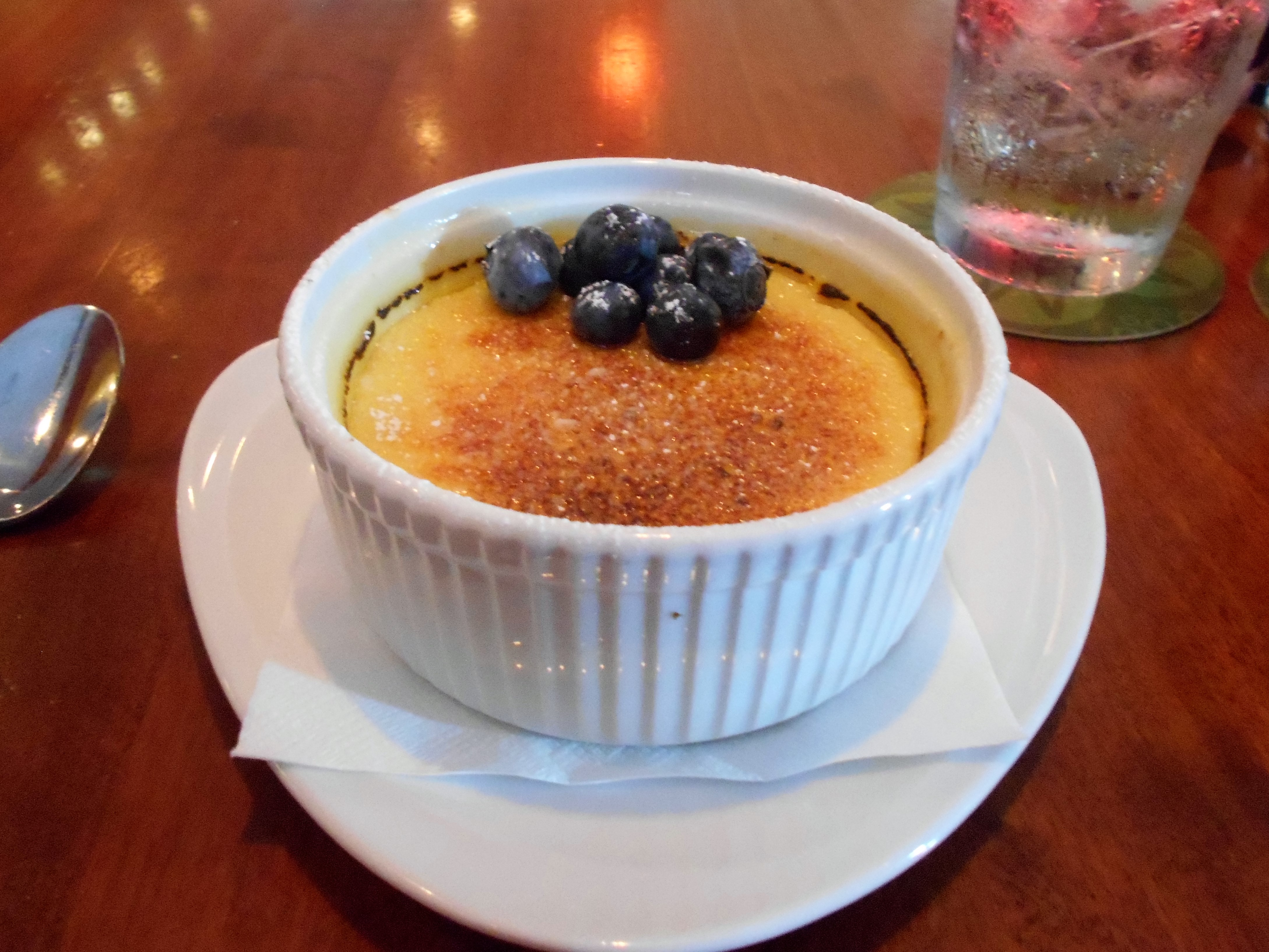 Eine Portion Crème brûlée, garniert mit einigen frischen Blaubeeren.